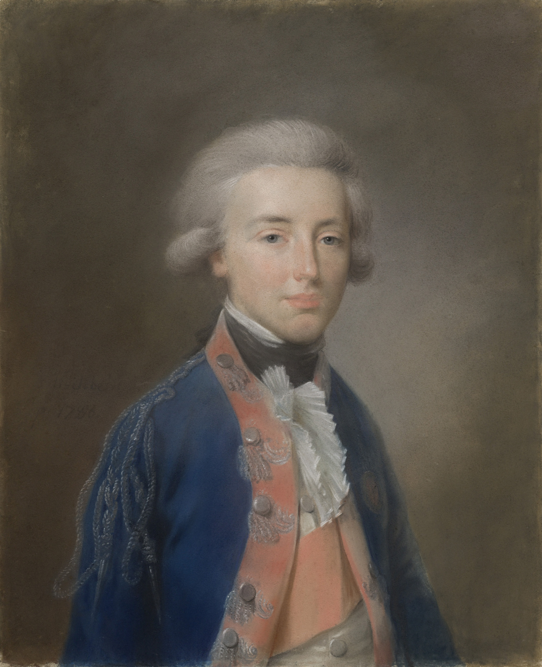 Portret van Willem Frederik (1772-1843, prins van Oranje-Nassau. Oudste zoon van prins Willem V, later Willem I, koning der Nederlanden. Ten halven lijve, naar rechts. Maakt deel uit van een reeks van negen portretten van prinsen en prinsessen uit het huis van Oranje-Nassau (SK-A-408/416). Onderdeel van de collectie pastels.